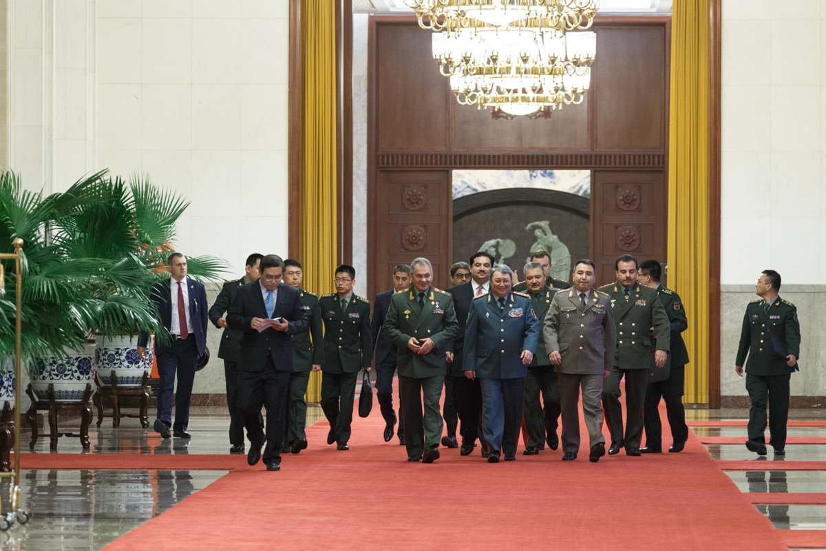 Встреча руководителей оборонных ведомств России, Индии, Казахстана, Киргизии, Китая, Пакистана, Таджикистана и Узбекистана с Председателем Китайской Народной Республики Си Цзиньпином